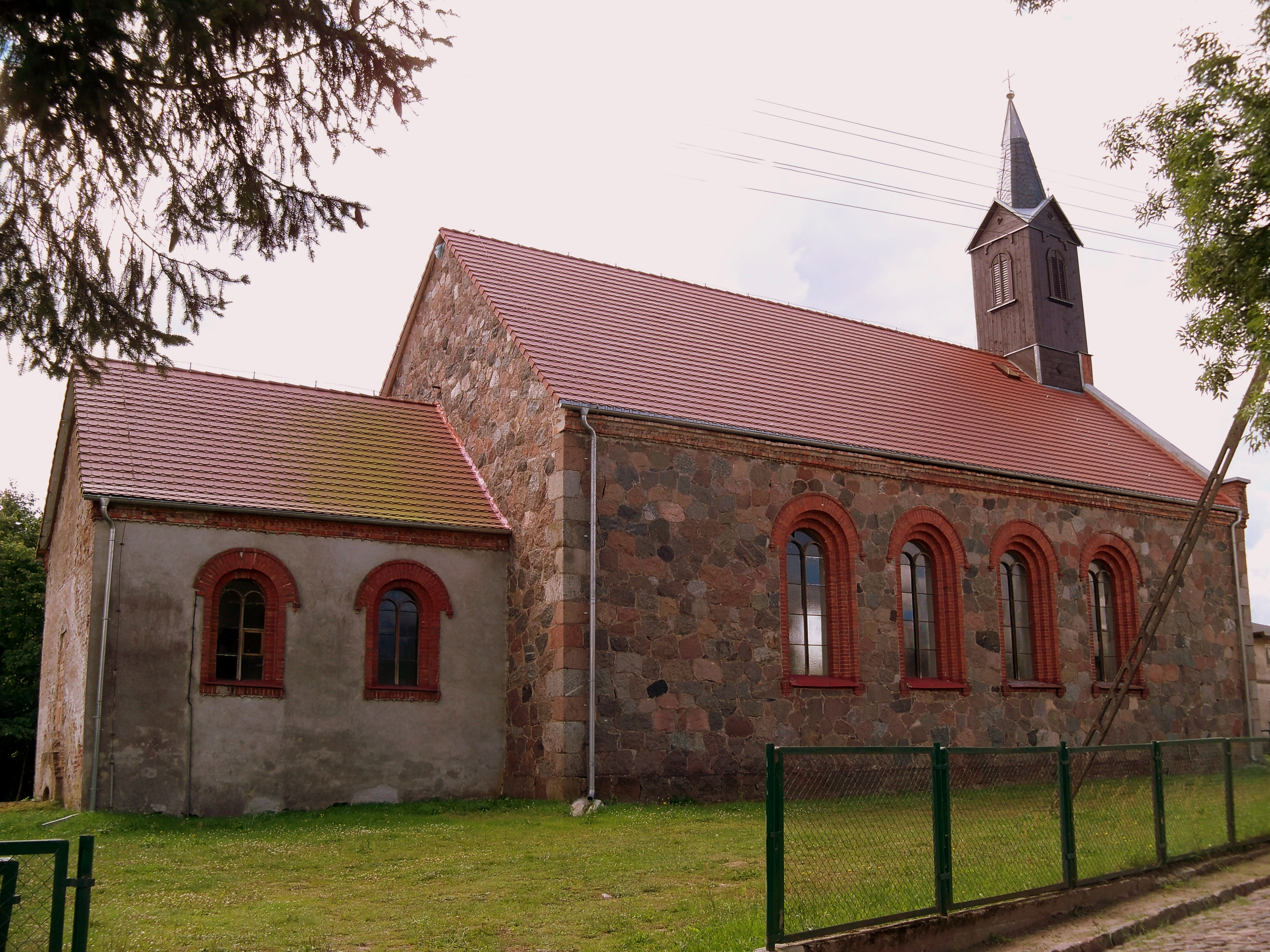 Głodowa - kościół MB Częstochowskiej